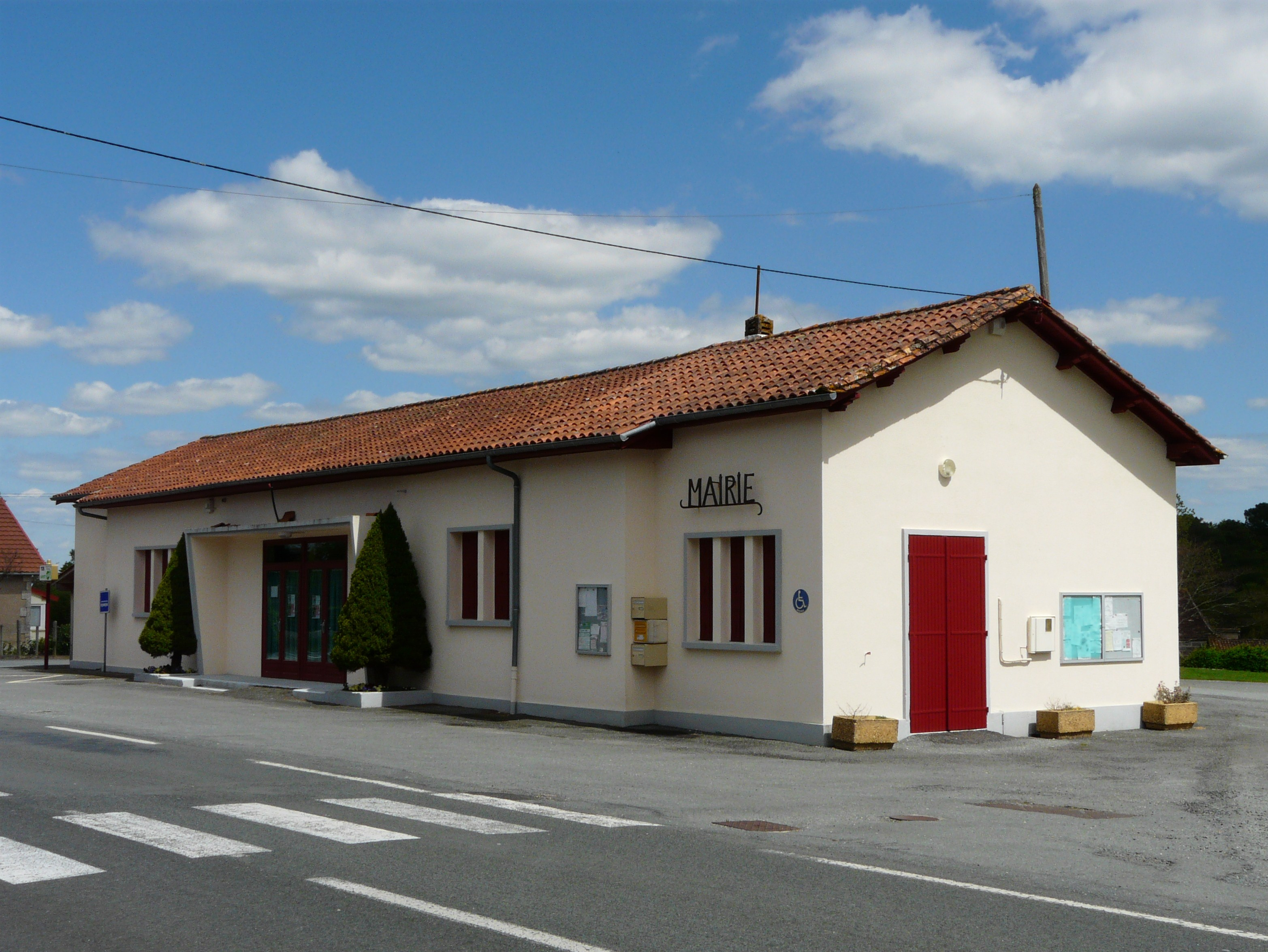 La mairie de Saint-Géry, Dordogne, France.